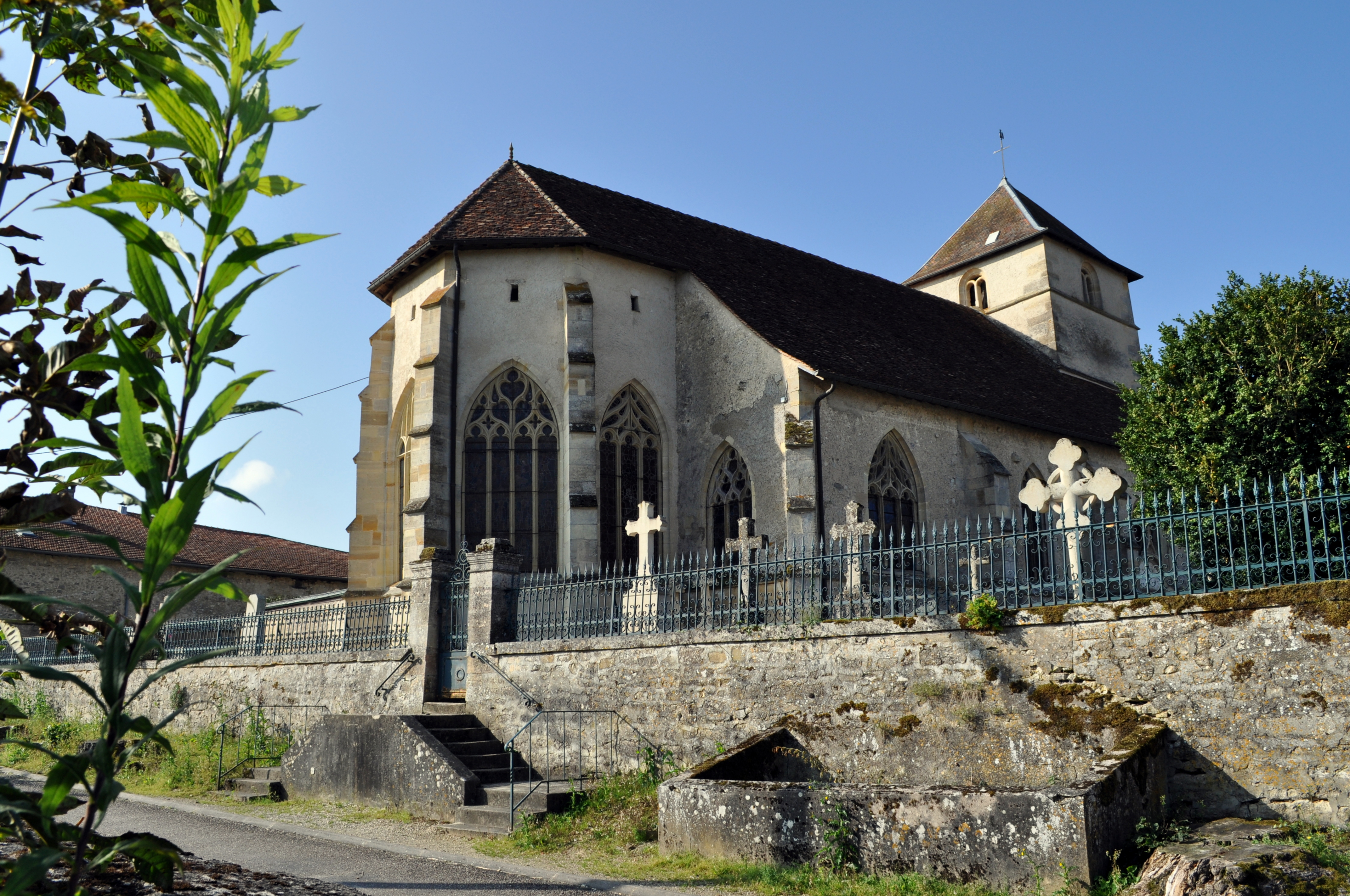 Église Saint-Martin de Nubécourt